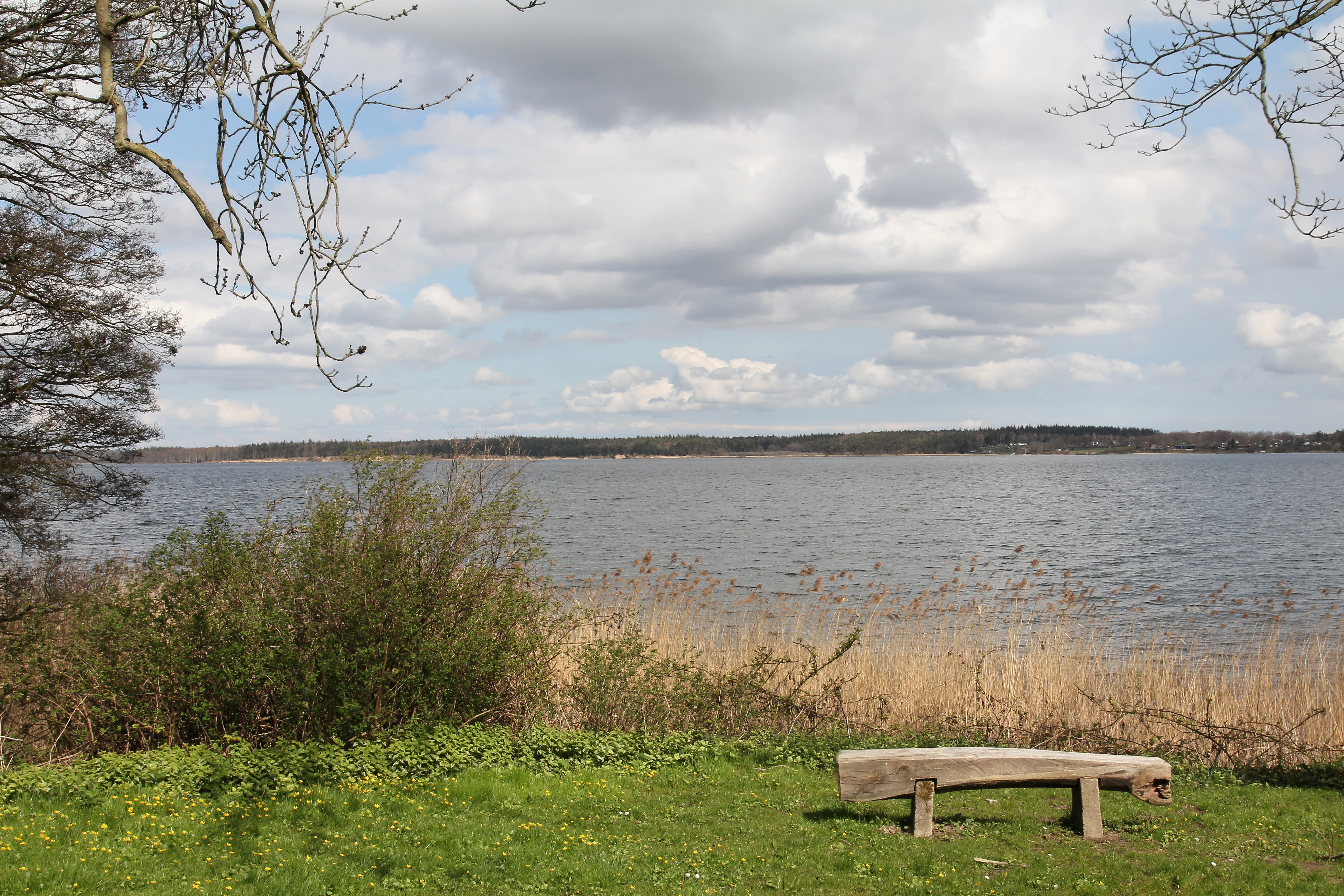 Güby, Louisenlund Blick über die Schlei